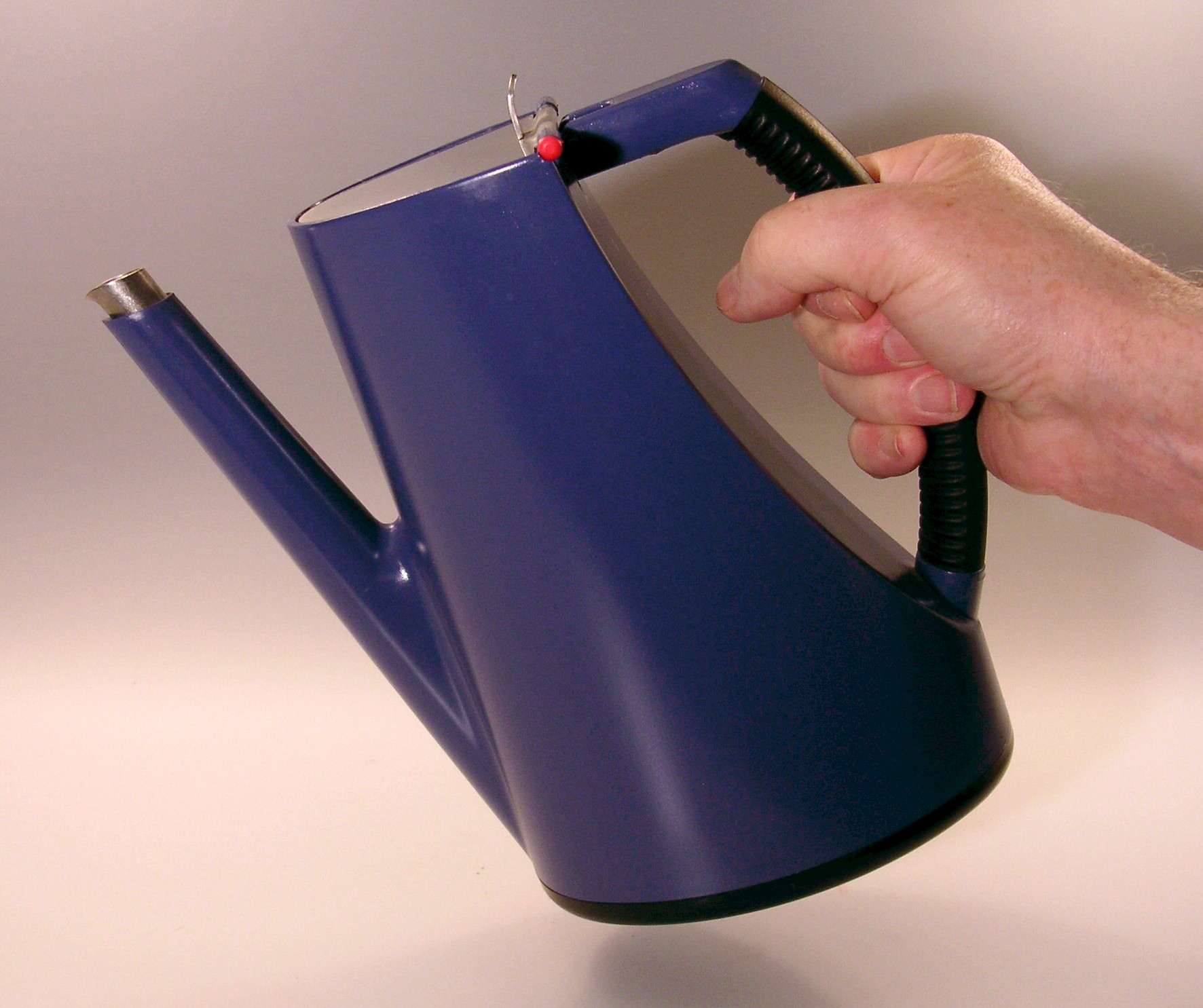 SAS-kannan